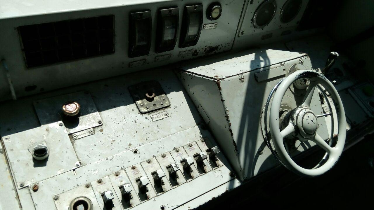 TCDD E14000 dizilerinin makinist mahallinden bir görünüm